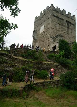 La Casaforte di Menolzio presso Mattie